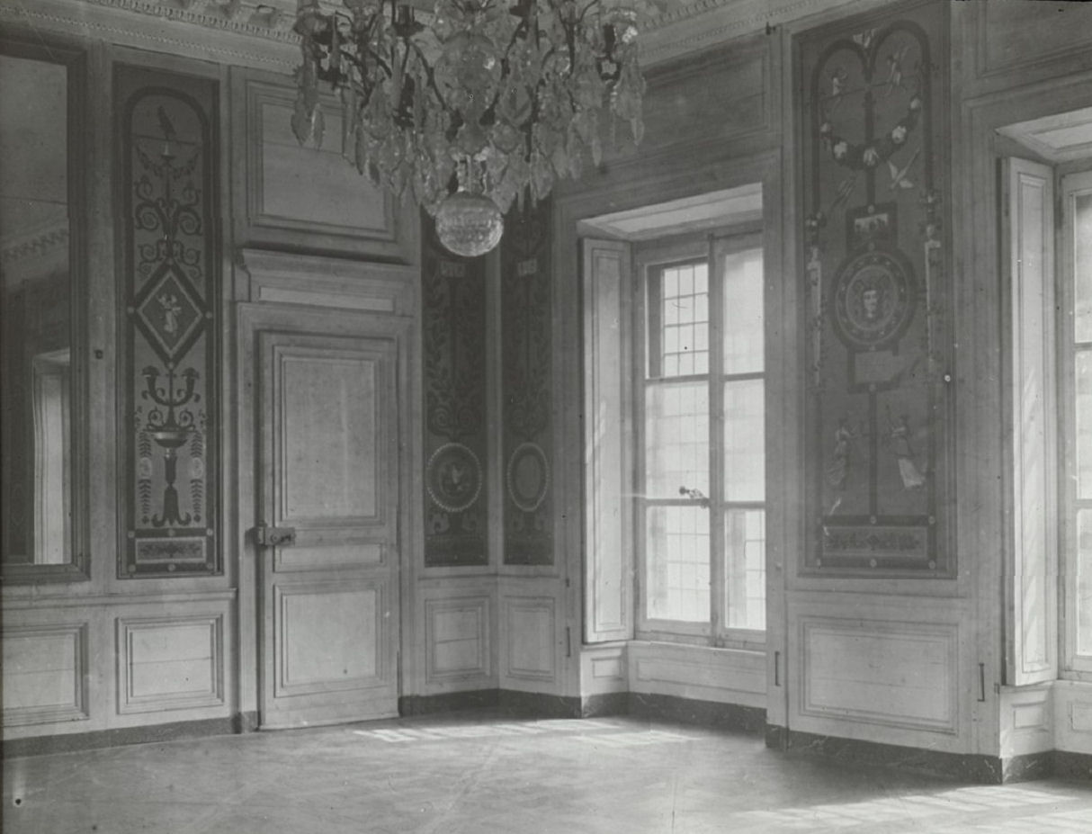 Vue intérieure du salon de la maison de la Reine dans le domaine de Marie-Antoinette en 1920